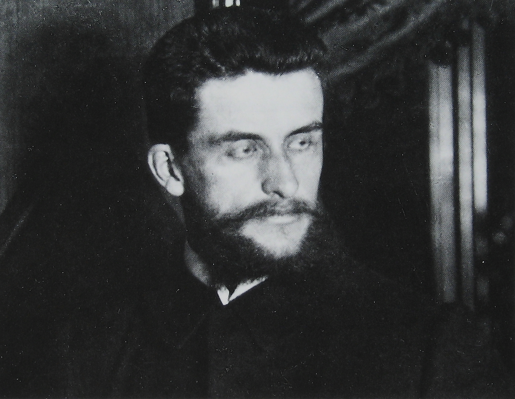 Selbstbildnis von Waldemar Titzenthaler